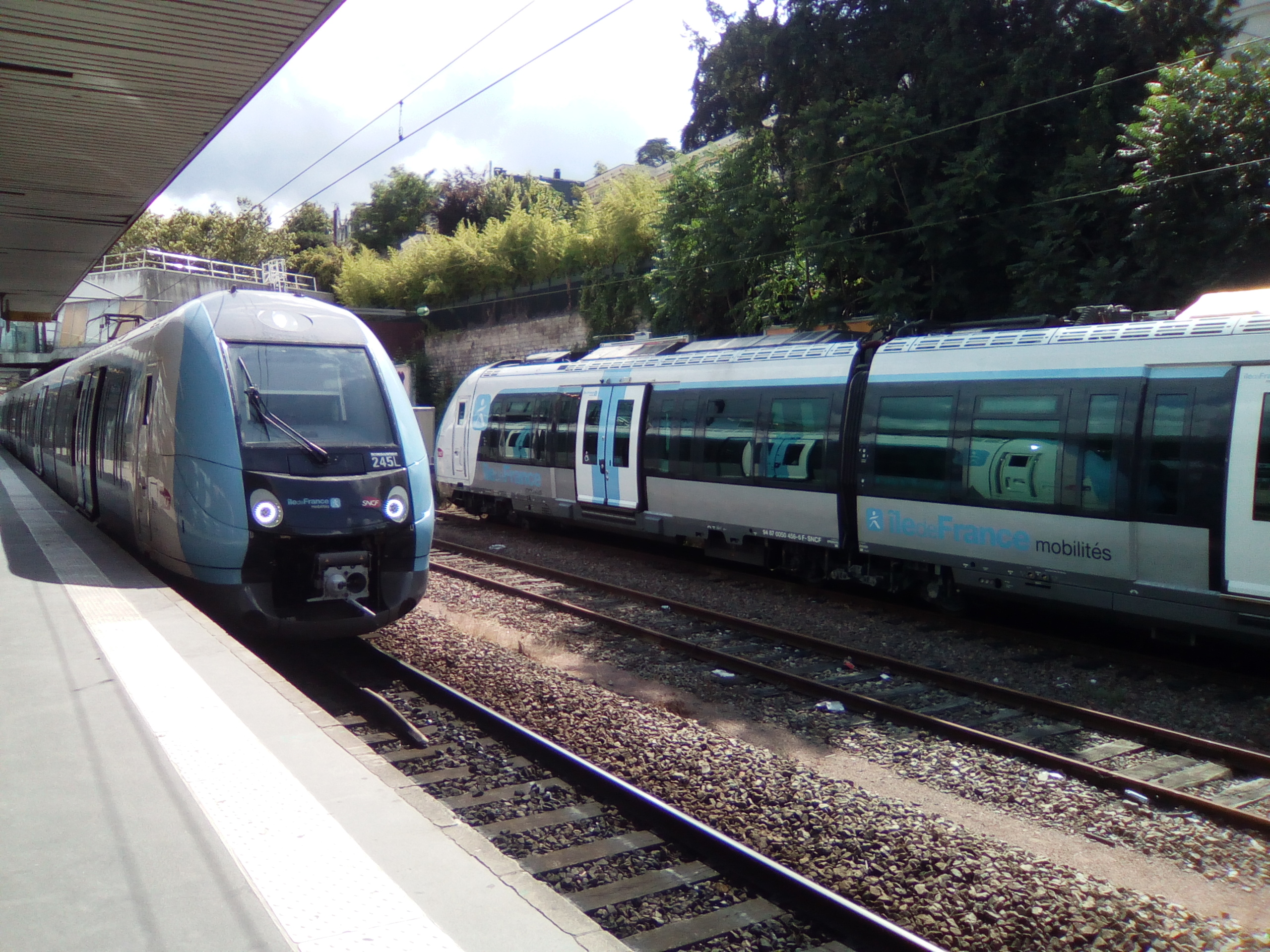 Train PASA à destination de Paris Saint-Lazare